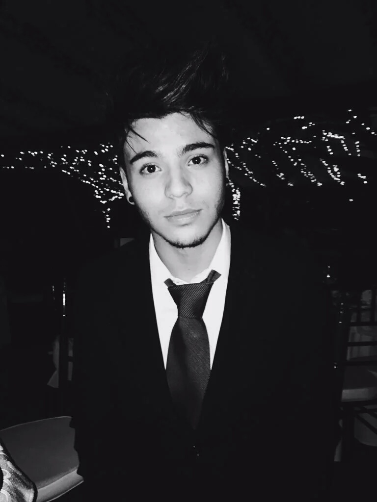 Sebatian Villalobos es un youtuber colombiano de 19 años,nacido un 17 de enero en Bucaramanga. El youtuber gano 2 premios MTV Millenial Awards: Francotuiteador Colombiano 2014 y YoSiTeDoyLikePapi del año 2015. Ademas gano´Favorito en la web´ en los Kids Choice Awards 2015. Fue presentador de Gana con Ganas, un programada de RCN Television y tambien fue uno de los presentadores de los Kids Choice Awards 2015. Se confirma la aparicion del colombiano en SOY LUNA, una serie de Disney Channel Latinoamerica que su temporda empezo el 2016, tambien aparecio en la segunda Temporada de SOY LUNA Actualmente Villalobos tiene mas de 5 millones de suscriptores en Youtube,mas de 4 millones de likes en Facebook, mas de 1 millon en twitter y 7 millones en Instagram